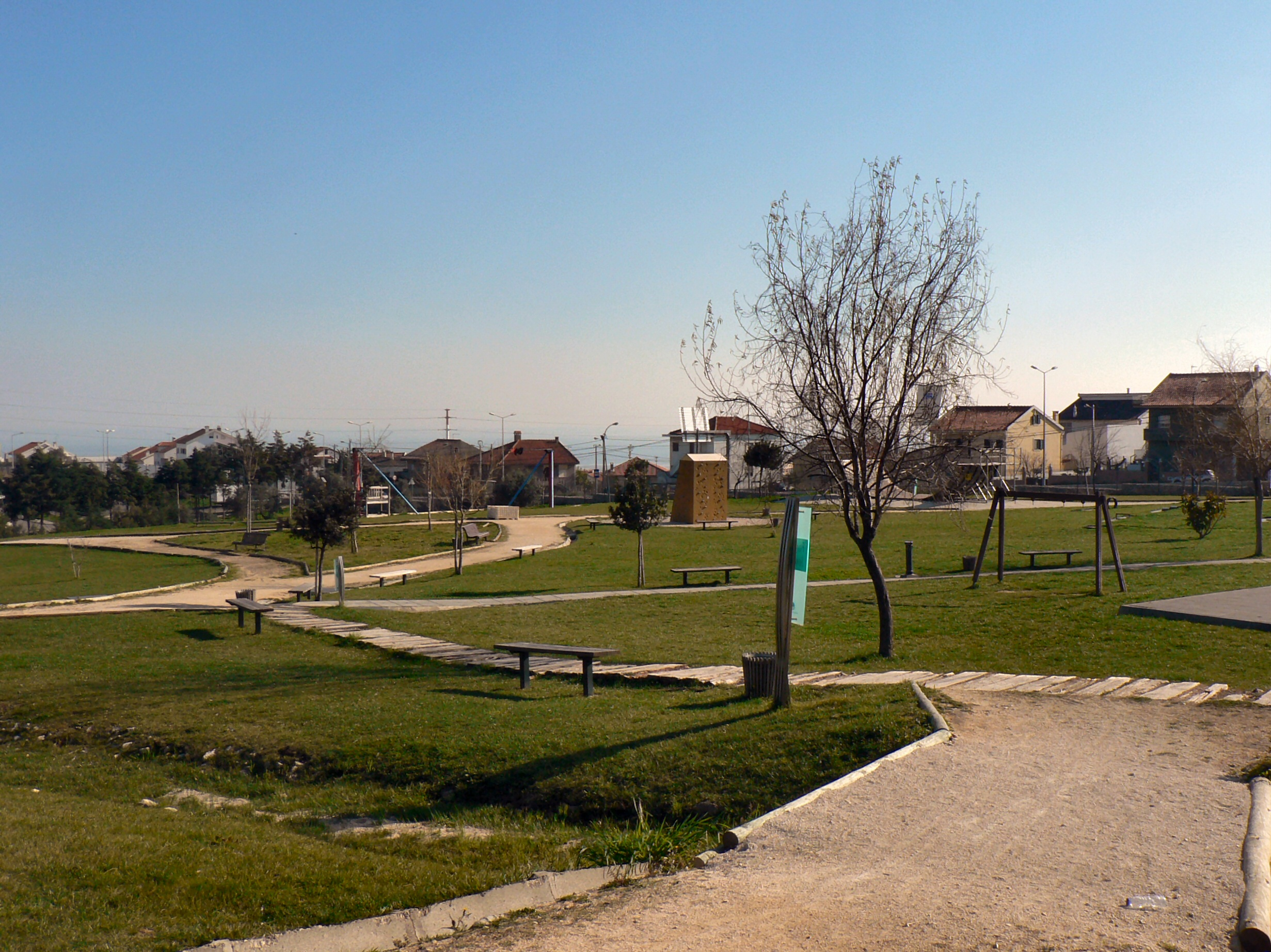 Parque Urbano de Santa Iria D'Azóia